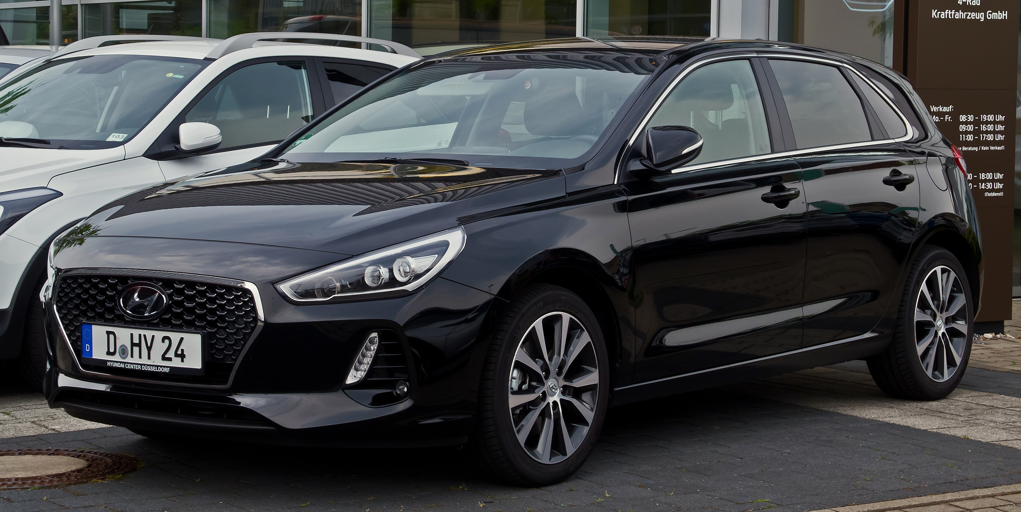 Hyundai i30 1.4 T-GDI Intro (III)